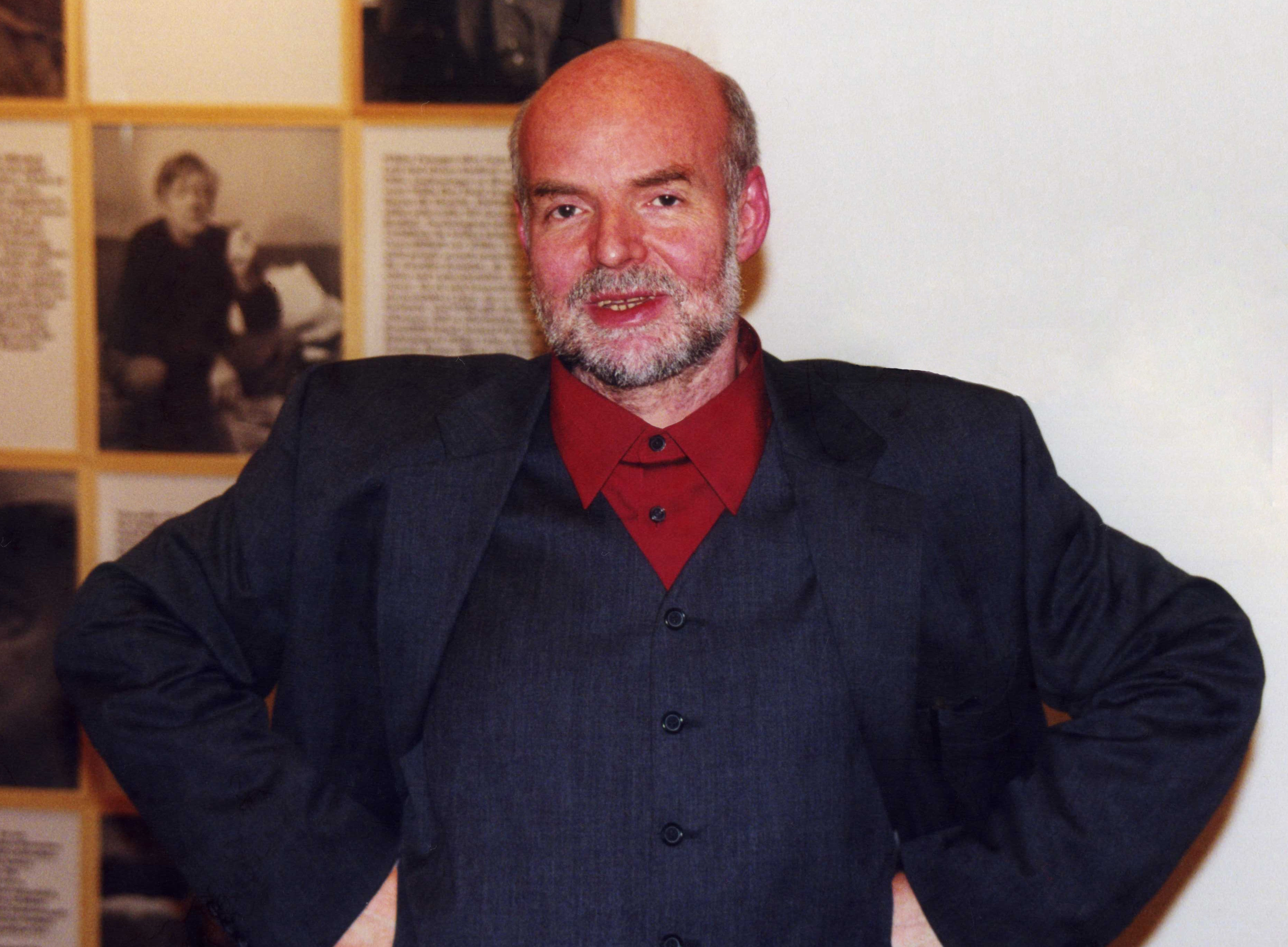 Wolfgang Theis bei einer Vernissage im Schwulen Museum